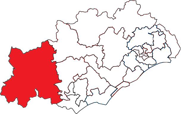 Situation du canton dans le département de l'Hérault